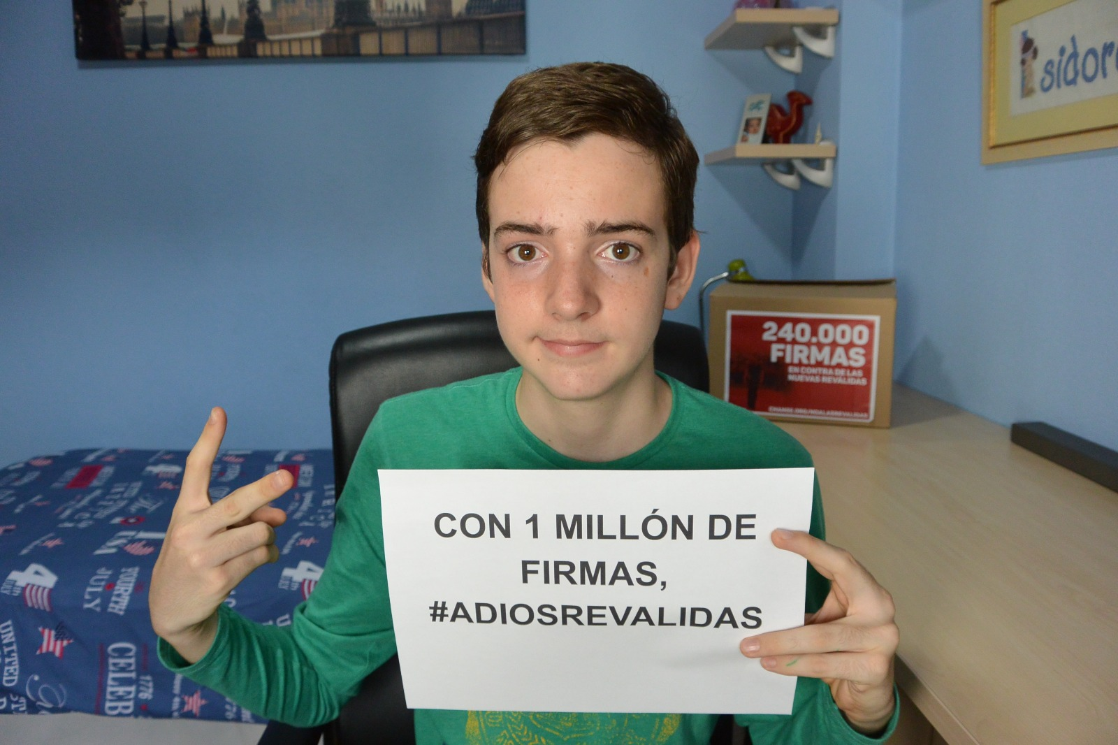 Isidoro declarando la victoria de su petición de firmas.